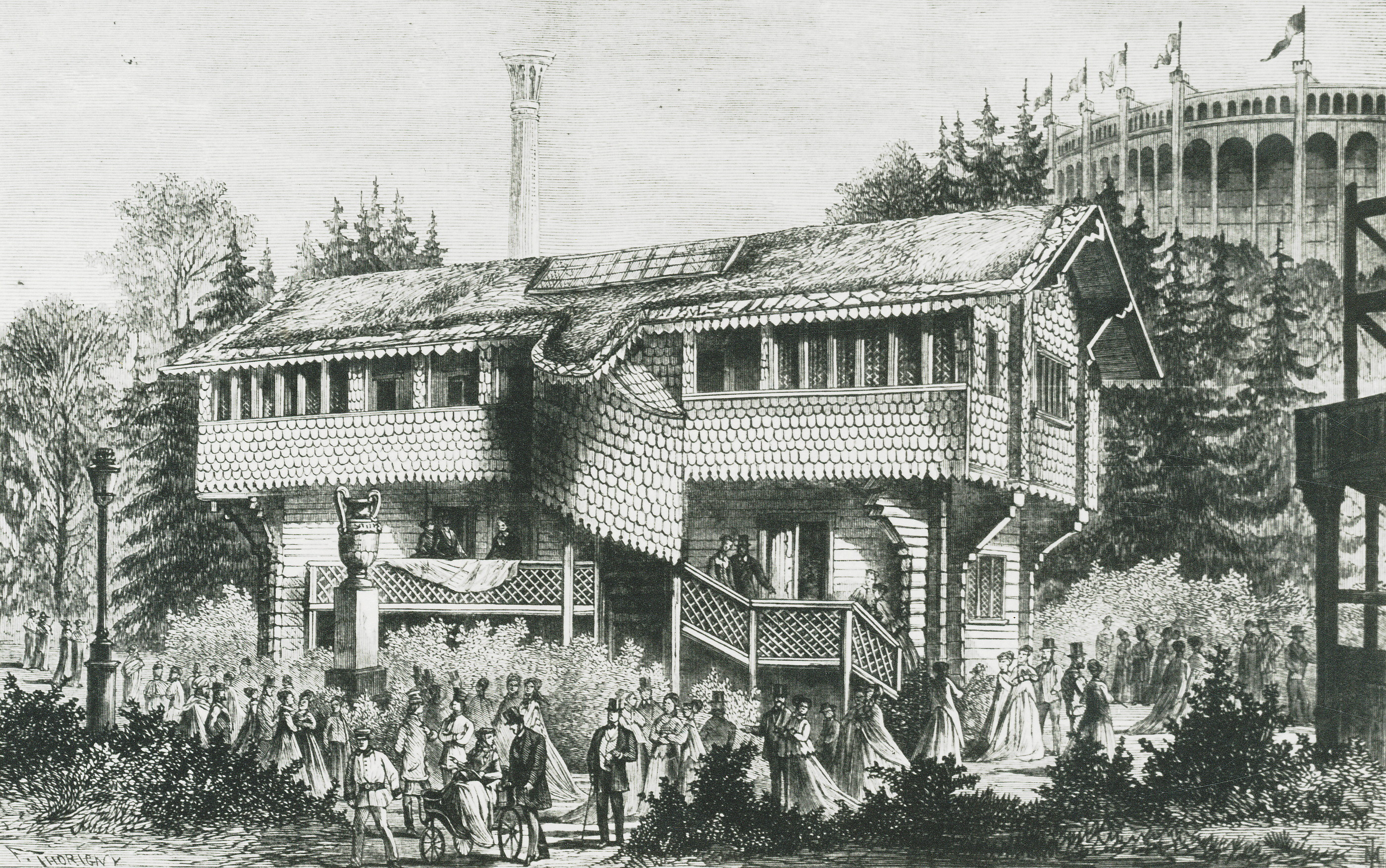 En kopia av Ornässtugan (med hjälp av arkitekten Fredrik Wilhelm Scholander) tjänstgjorde som Sveriges kansli och utställningshall vid världsutställningen i Paris 1867. När utställningen var över lät kung Karl XV återuppbygga loftbyggnaden i Ulriksdals slottsträdgård där den finns än idag. Samtida trägravyr.